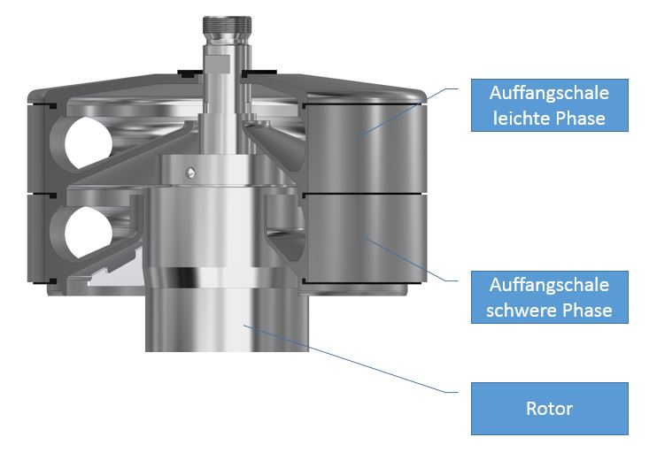 Auffangschalen eines Rotors zur Trennung zweier Flüssigkeiten